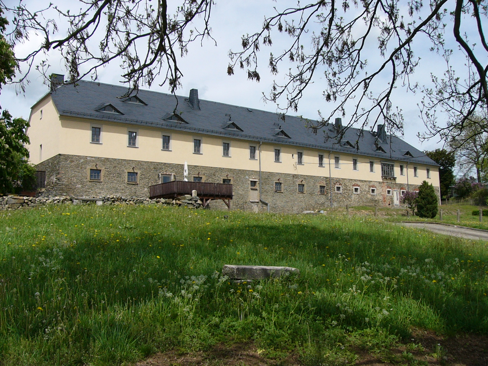 Haupthaus des Rittergutes Planschwitz